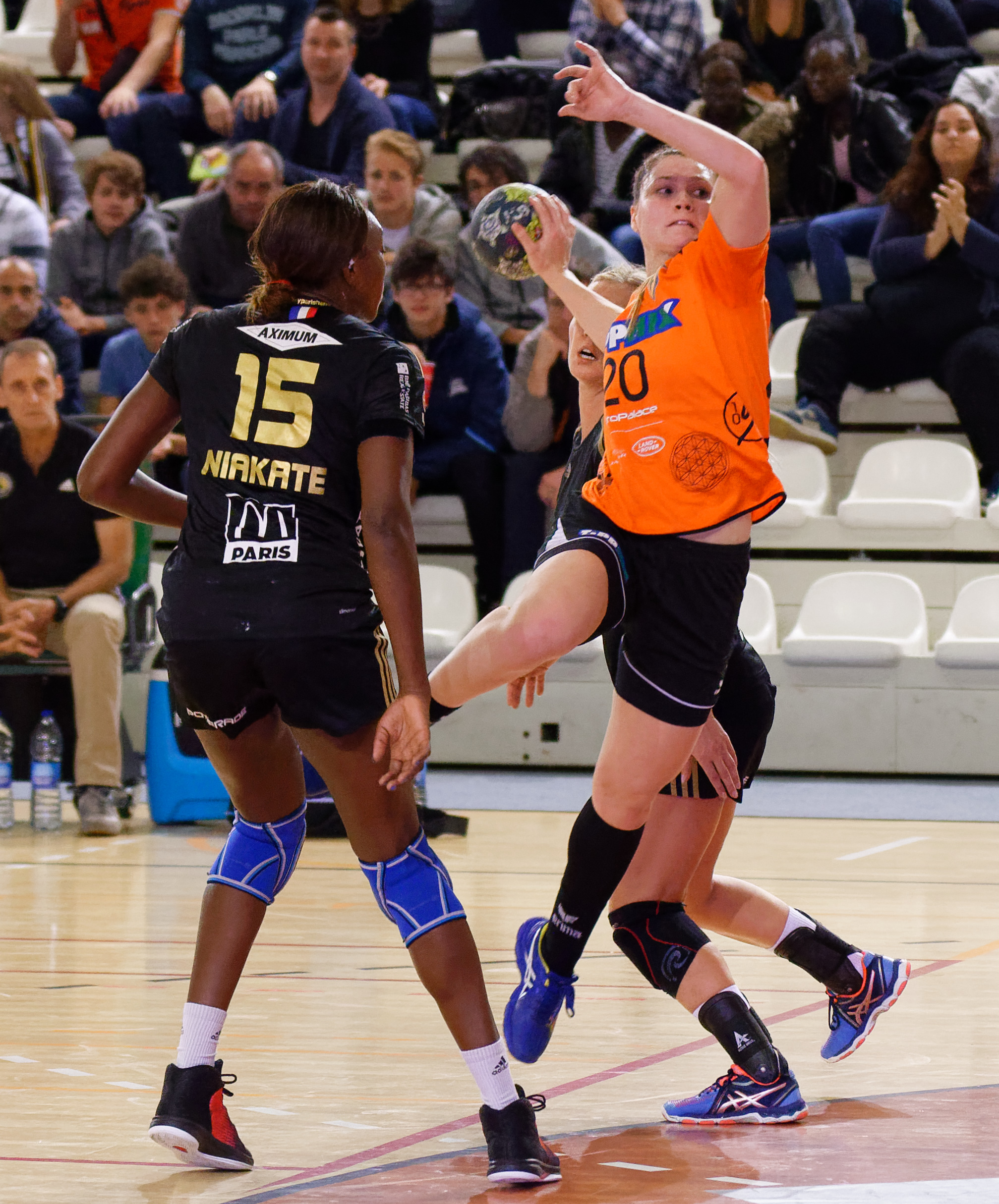 Rencontre du 2e tour de la coupe EHF entre Issy Paris Hand et Érd HC. A Issy Les Moulineaux, le 23 octobre 2016.